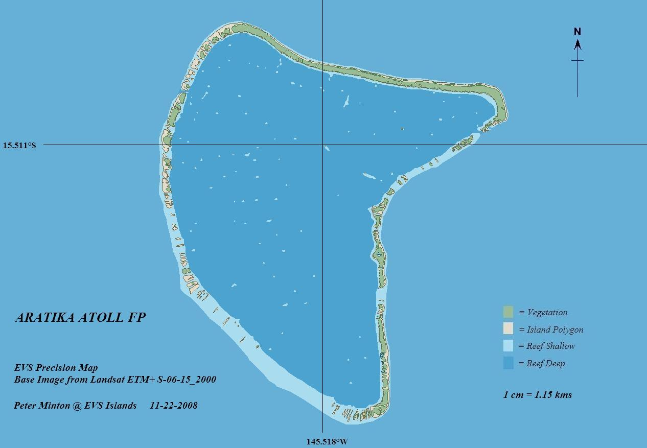 Aratika Atoll - EVS Precision Map (1:115,000)